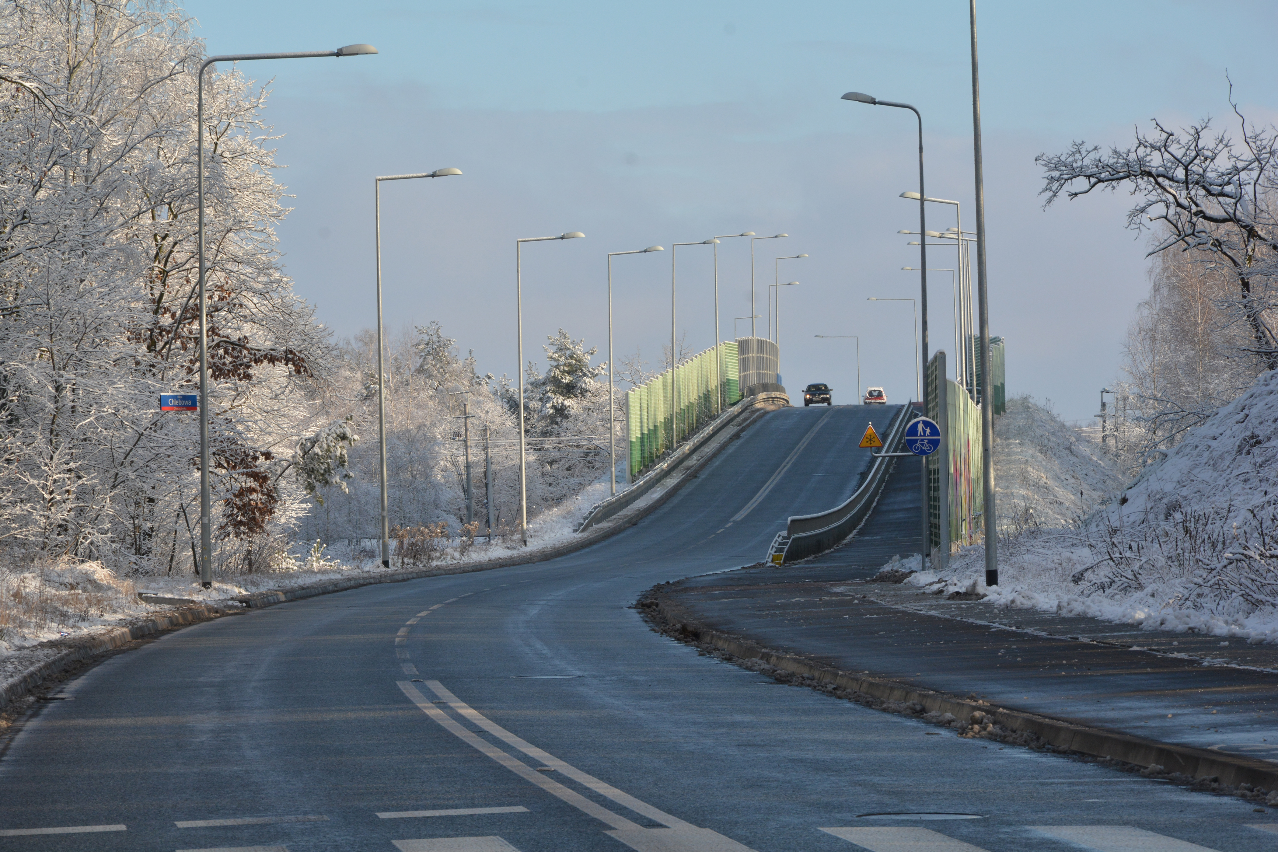 Wiadukt na ulicy Jeżowskiego (dawniej Mehoffera-bis) nad linią kolejową E65 Warszawa - Gdańsk w zimie. Osiedle Choszczówka na warszawskiej Białołęce